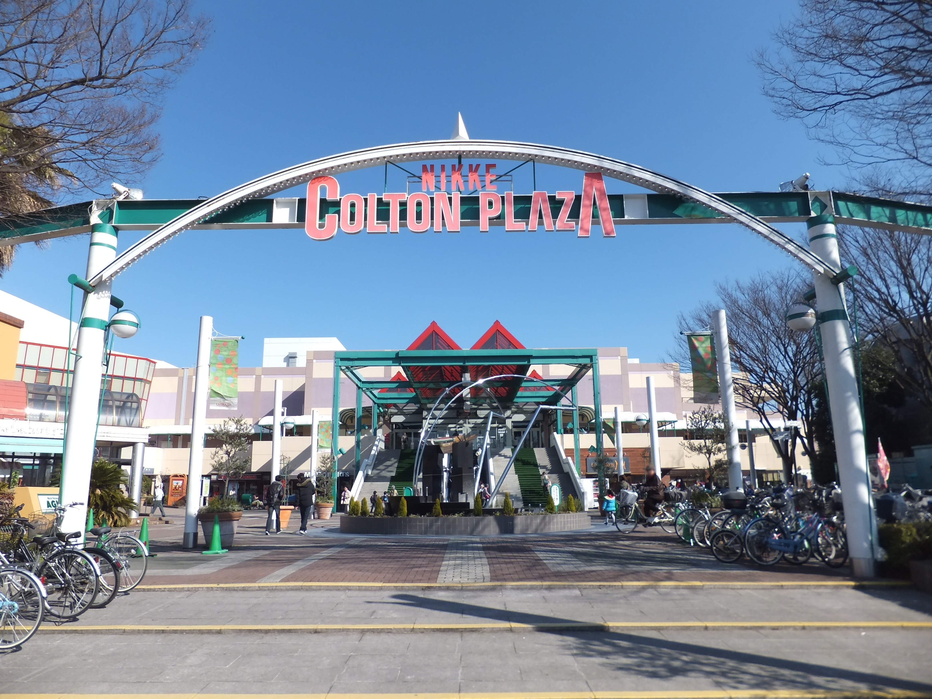 ニッケコルトンプラザ西入口